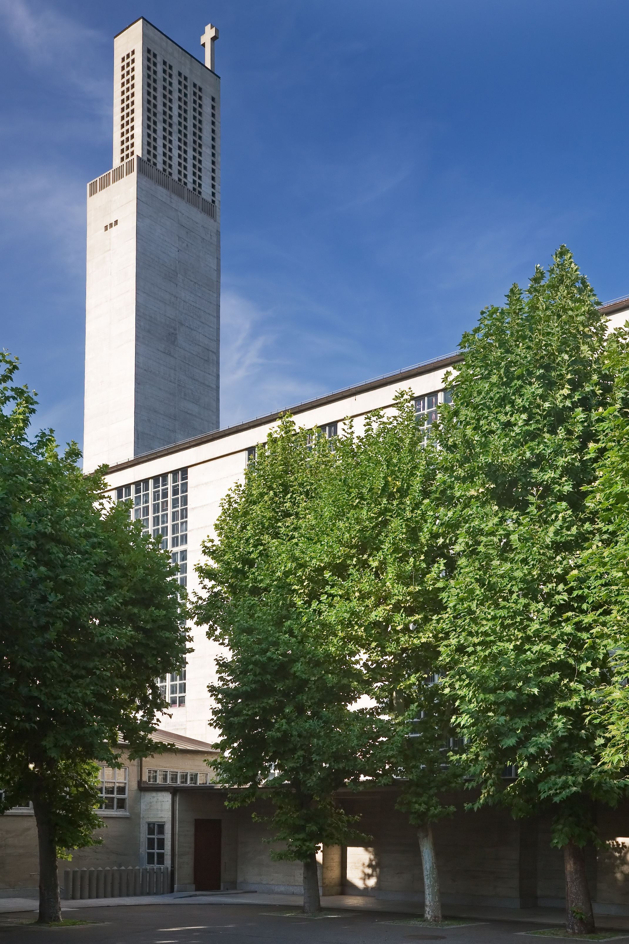 Aussenansicht der Antoniuskirche in Basel, Schweiz